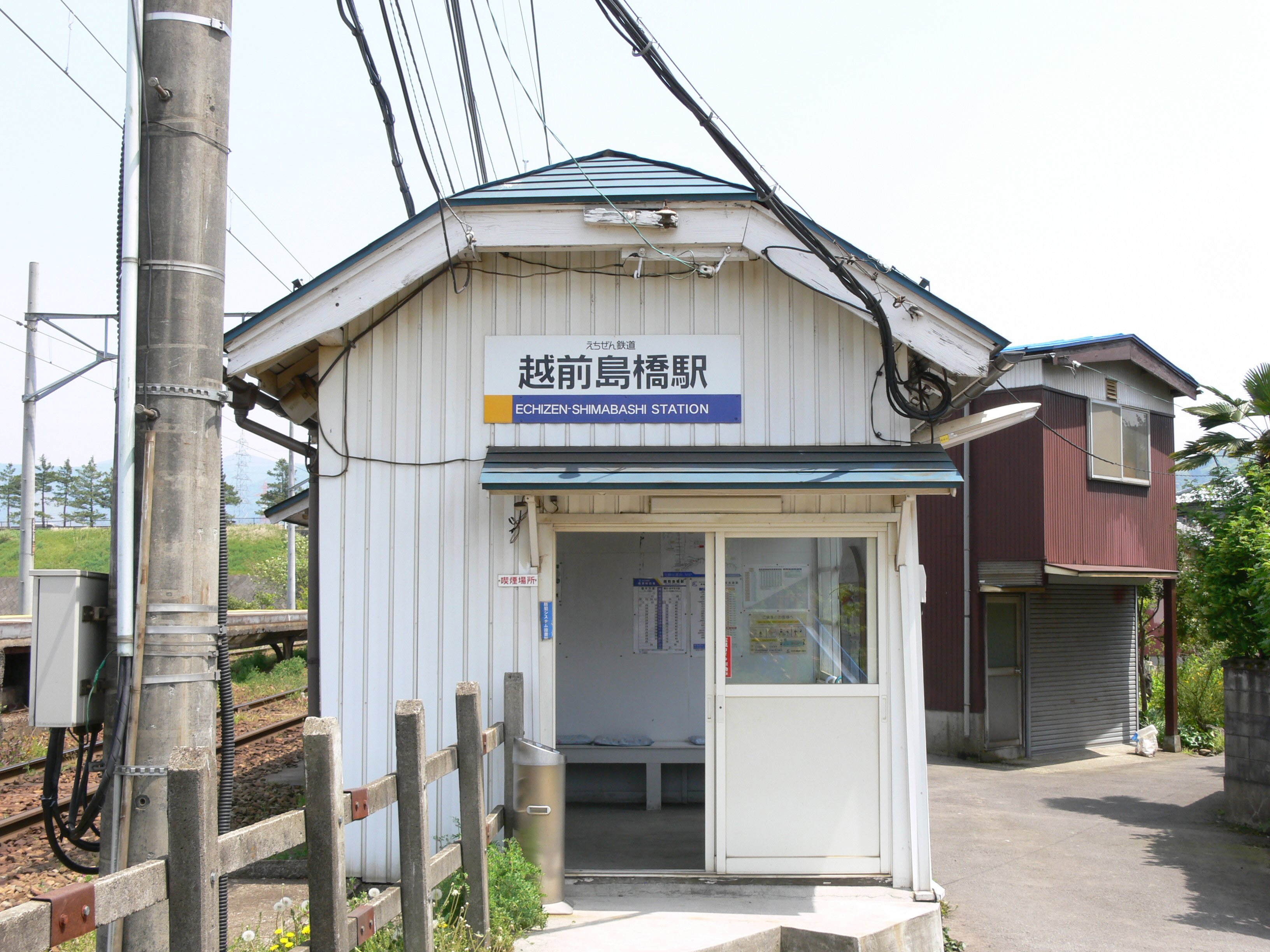 Echizen-Shimbashi Station